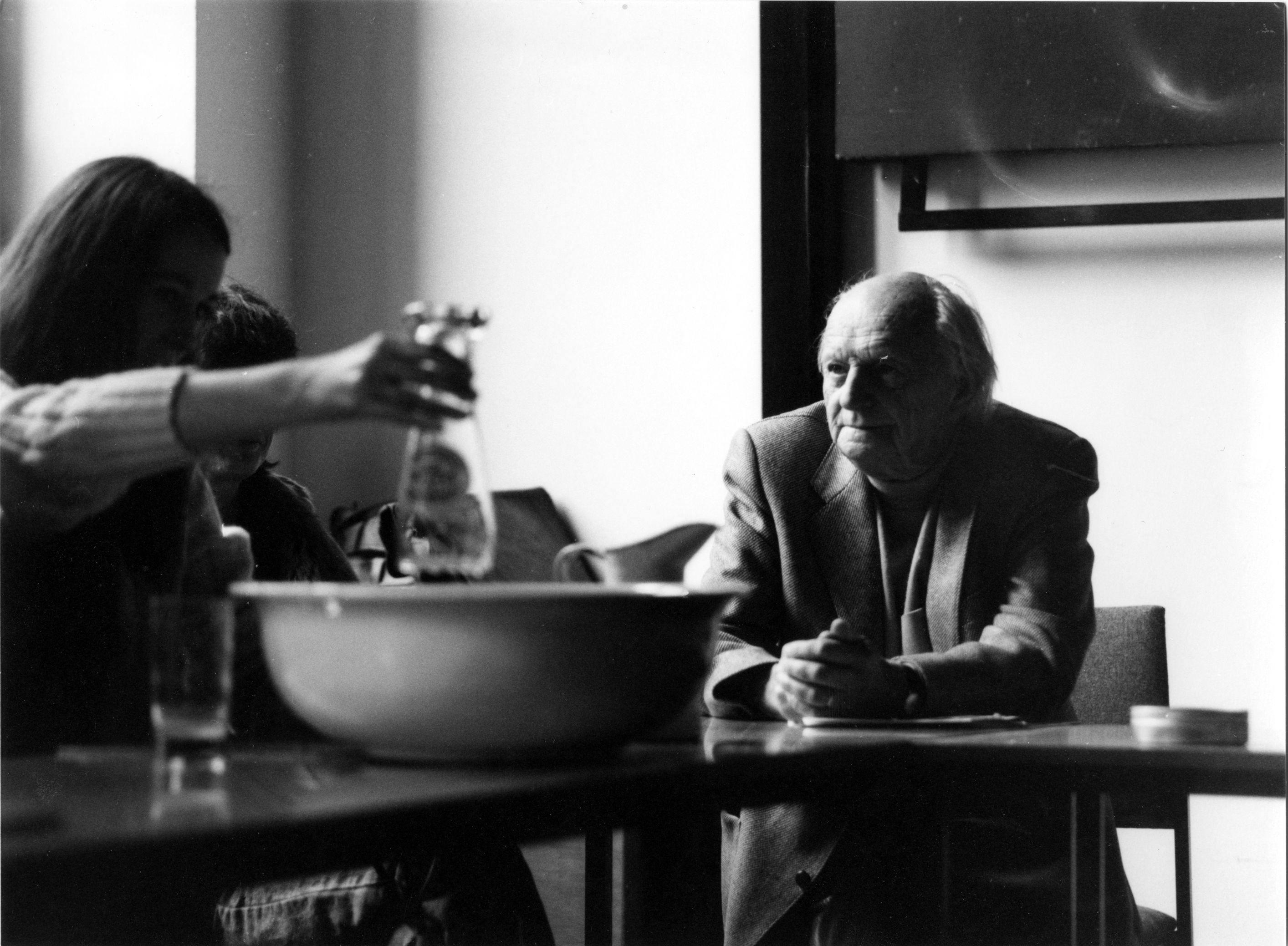 Martin Wagenschein 1983 in Darmstadt bei einer Vorführung des Lehrstücks "Pascals Barometer". Anwesend und beteiligt waren, neben den Lehrkunstdidaktikern um Hans Christoph Berg, auch Otto Herz sowie die Lehrerinnen und Lehrer zweier Alternativschulen, der Glockseeschule und der Freien Schule Frankfurt.